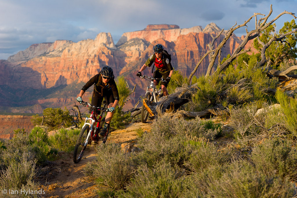 中文（中国大陆）: 山地车 林道 越野